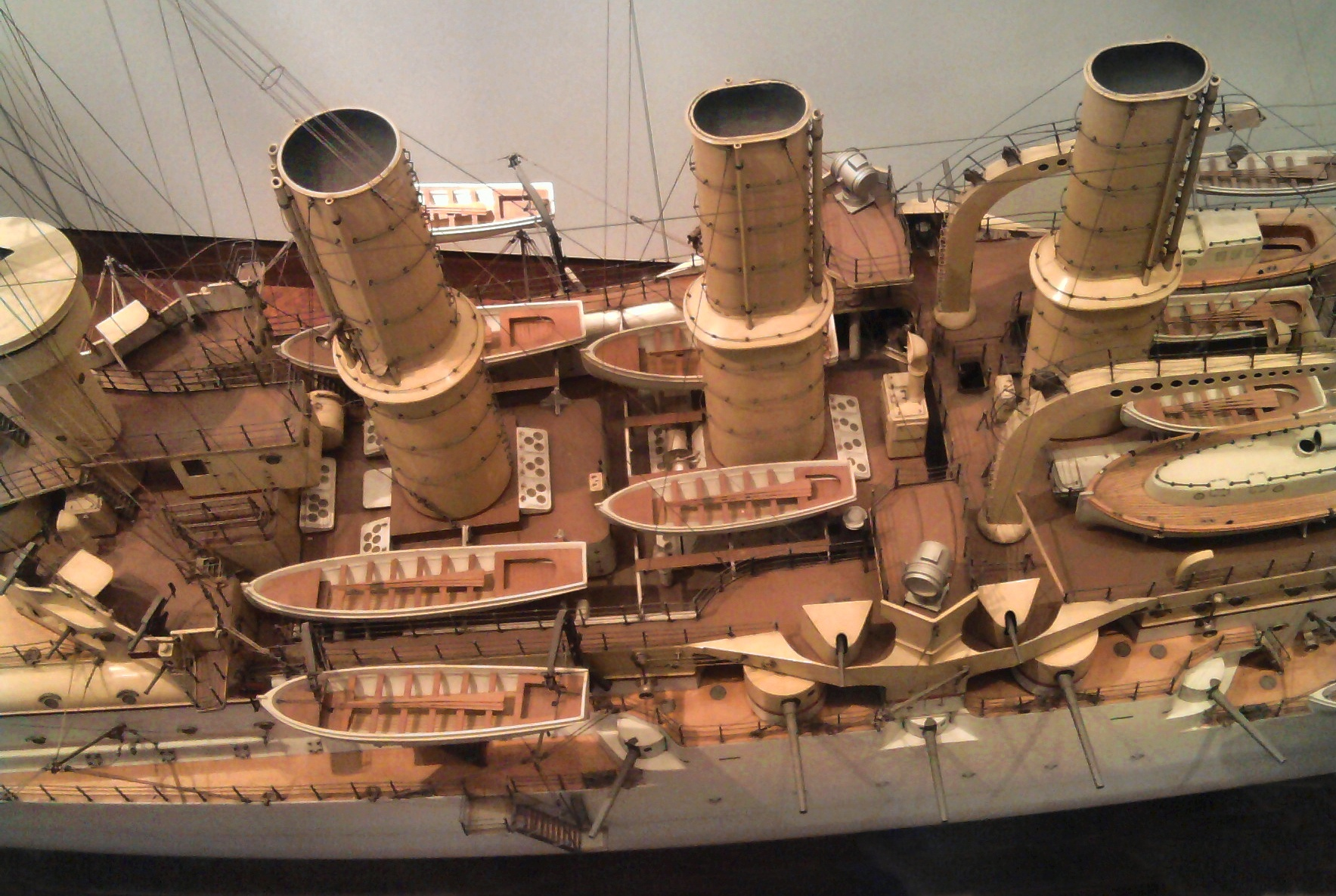 SMS Friedrich Carl Miniature, midsection, in the Deutsches Museum